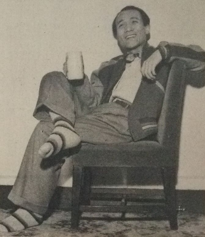 川田晴久